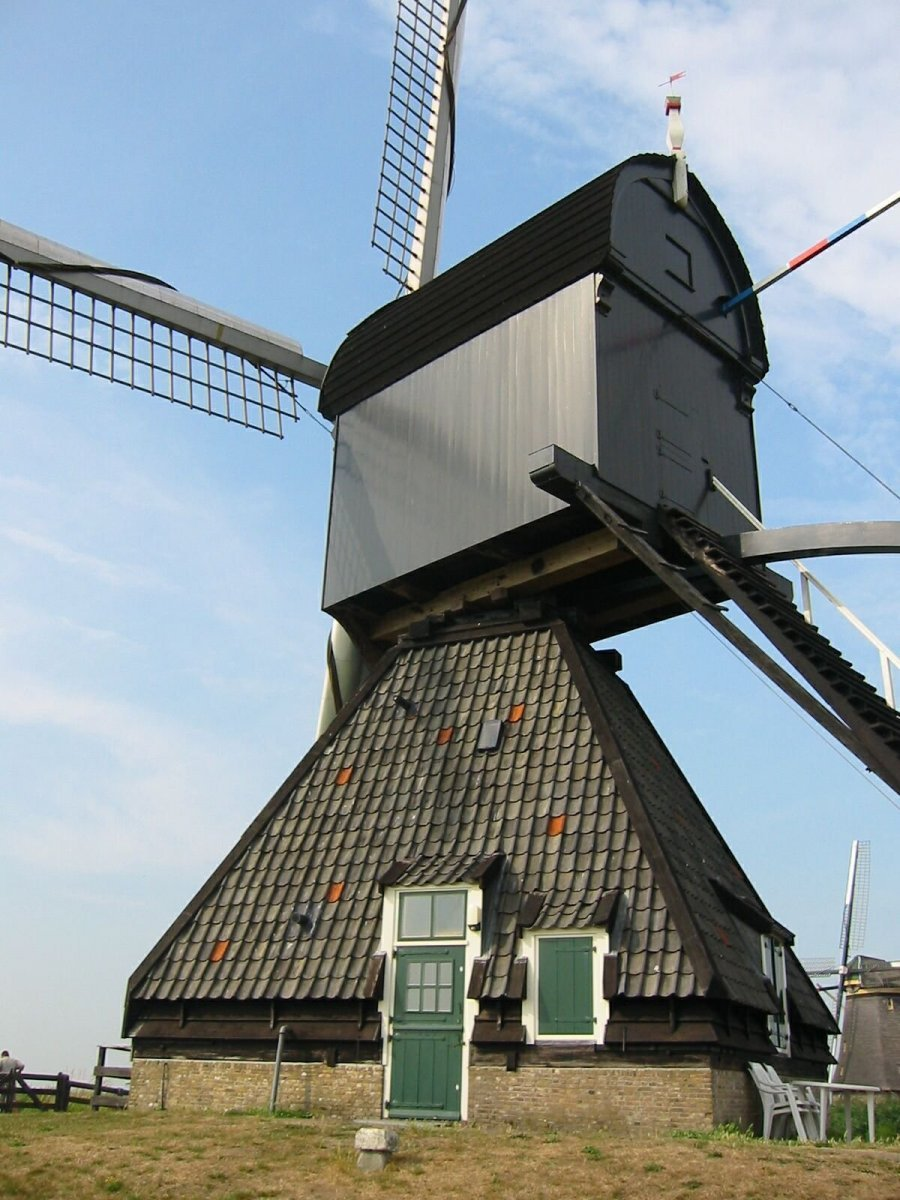 De Blokker/ Blokweerse Molen: Wipmolen te Kinderdijk schuin van opzij gefotografeerd (opmerking: Foto gemaakt in het kader van het project Actualisering Monumentenregister (AMR).)